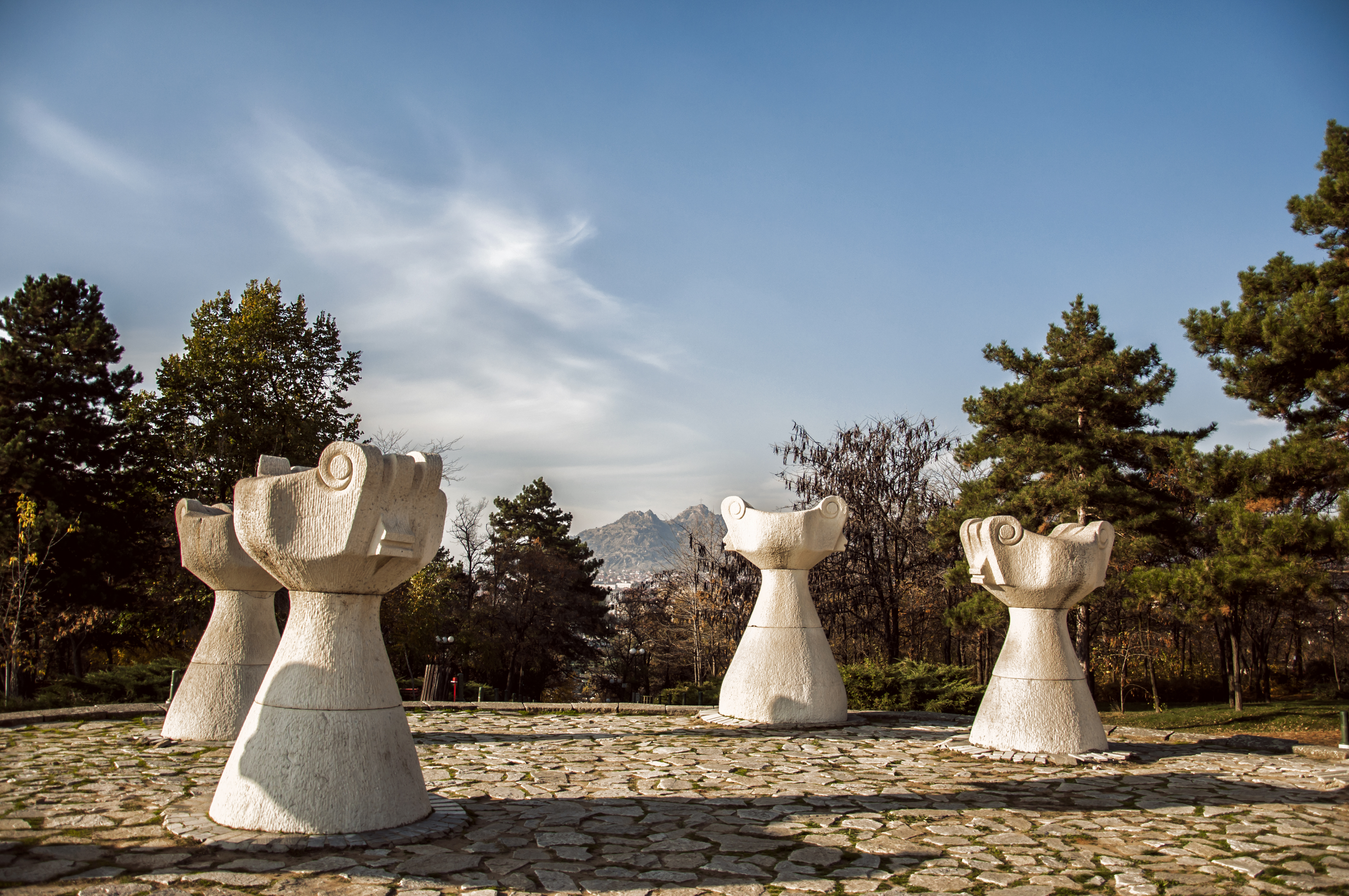 Споменици на паднатите борци - Прилеп преку ден